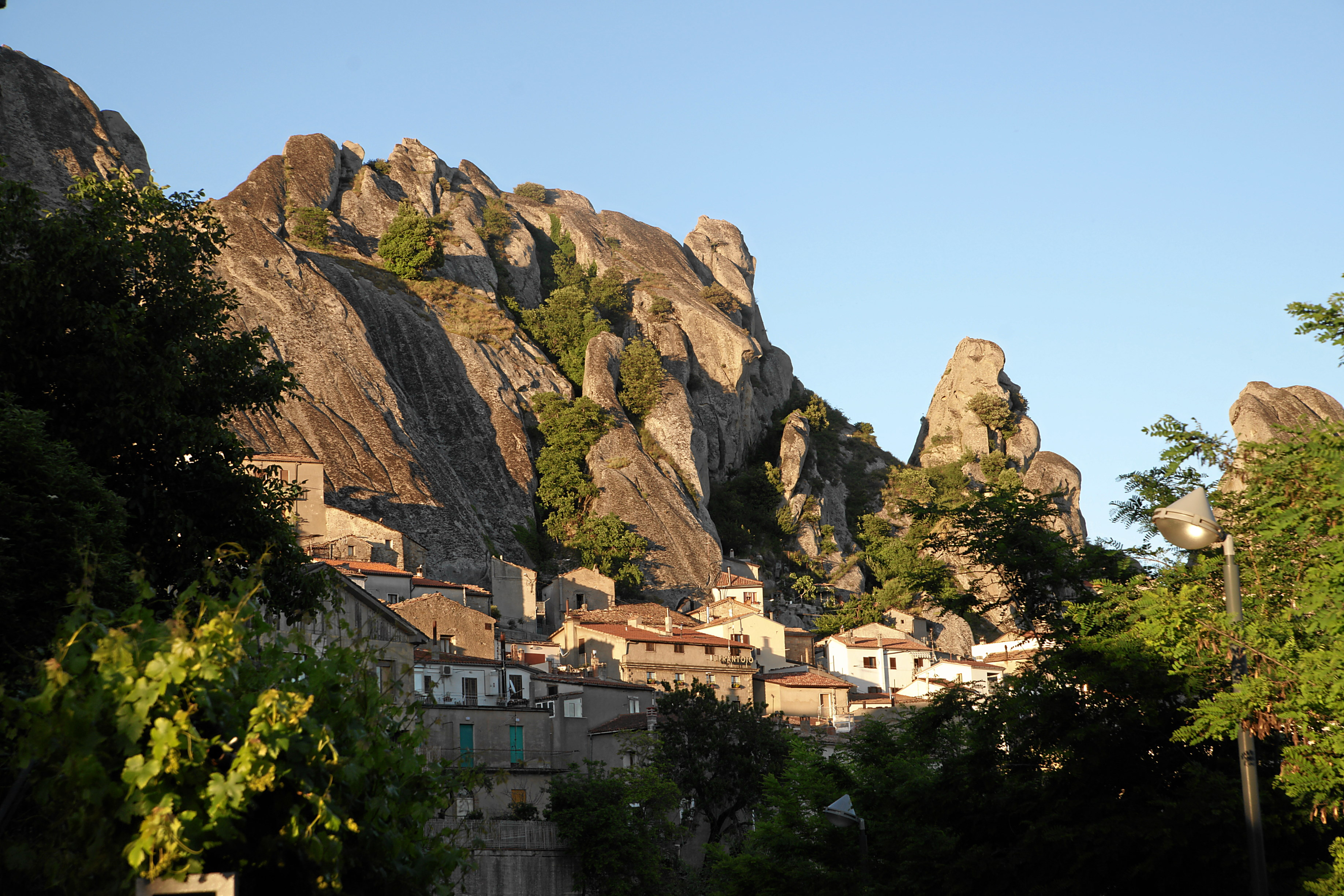 Pietrapertosa